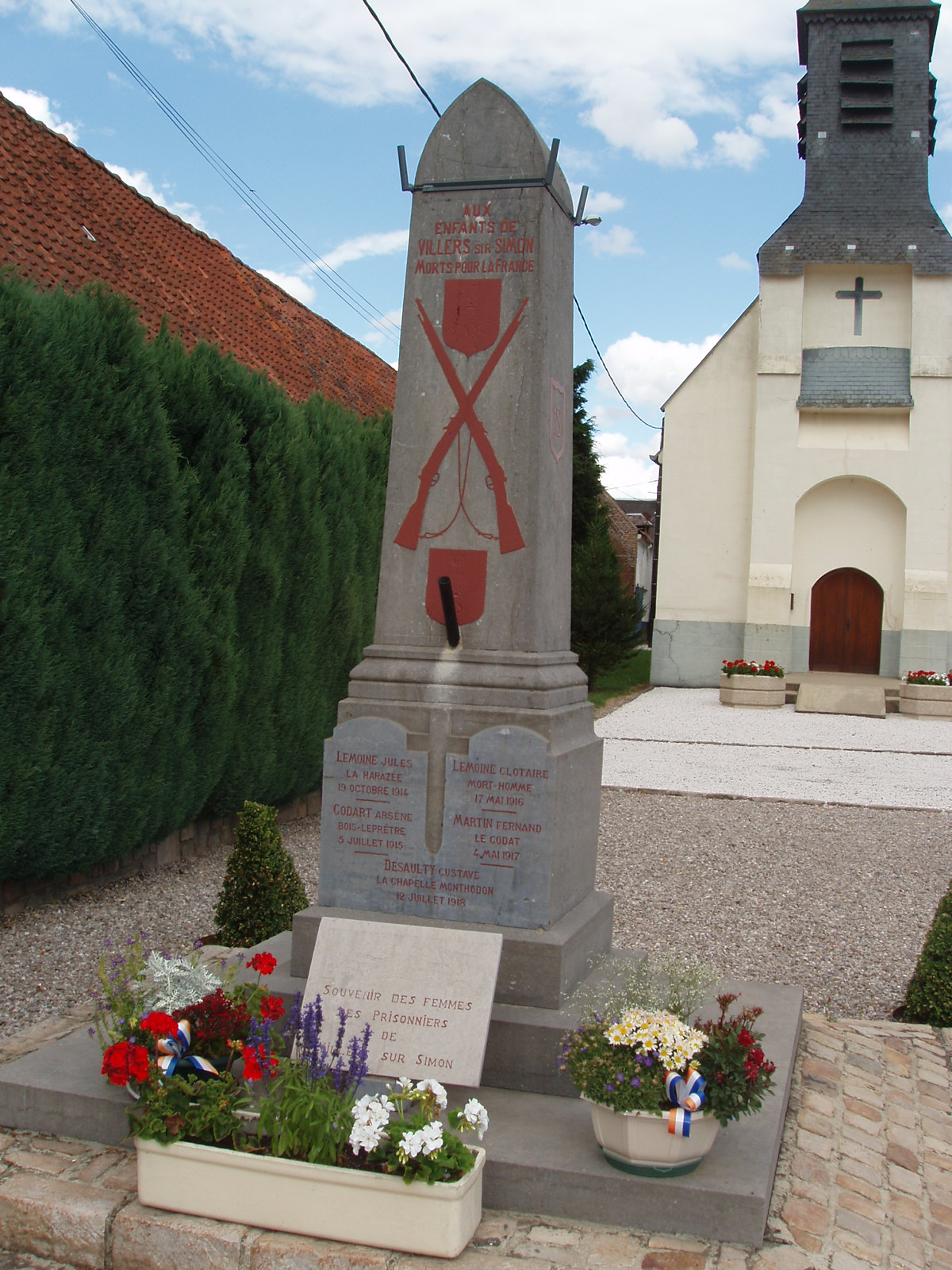 Commune française de Villers-Sir-Simon dans le département du Pas-de-Calais en France - Monument aux Morts